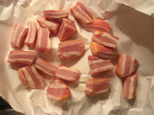 Tocino de cerdo en trocitos